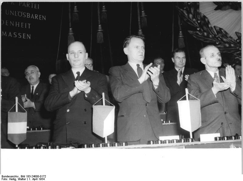 ADN-ZB-Heilig Hlg.-Schm 1.4.1954 IV. Parteitag der Sozialistischen Einheitspartei Deutschlands, Berlin, Werner-Seelenbinderhalle UBz.: Gäste der Bruderparteien im Präsidium. Von links nach rechts: Genosse Waldeck Rochet, Mitglied des Politbüros der Kommunistischen Partei Frankreichs, Genosse Julius Duris, Mitglied des Präsidiums des Zentralkomitees der Kommunistischen Partei der Tschechoslowakei und Minister der Finanzen. Gen. Franciszek Jozwiack-Witold, Mitglied des Politbüros und Vorsitzender der Zentralen Partei-Kontrollkommission der Vereingten Polnischen Arbeiterpartei und Minister für Staatskontrolle. Stammabzug darf nicht aus dem Hause